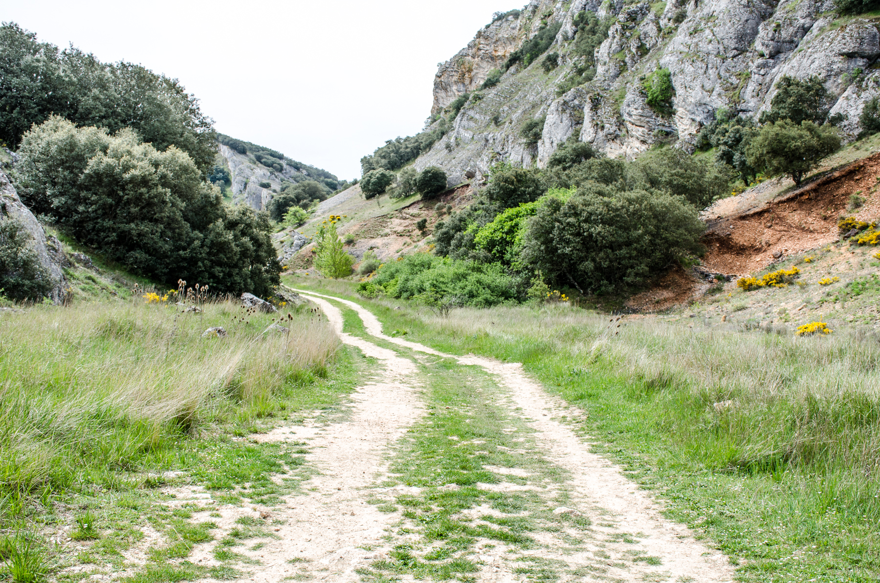 Icedo (España) - Desfiladero del Butrón (entre Icedo y Boada)